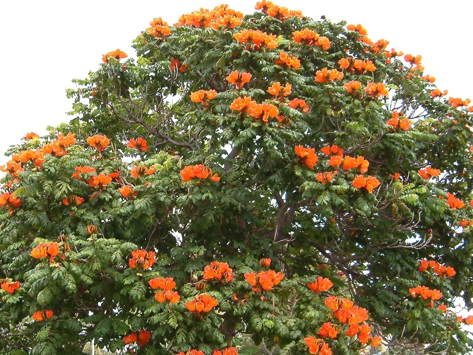 Madeira_Funchal_Afrikanischer_Tulpenbaum_im_Mai_2007. Photograph: Peggy